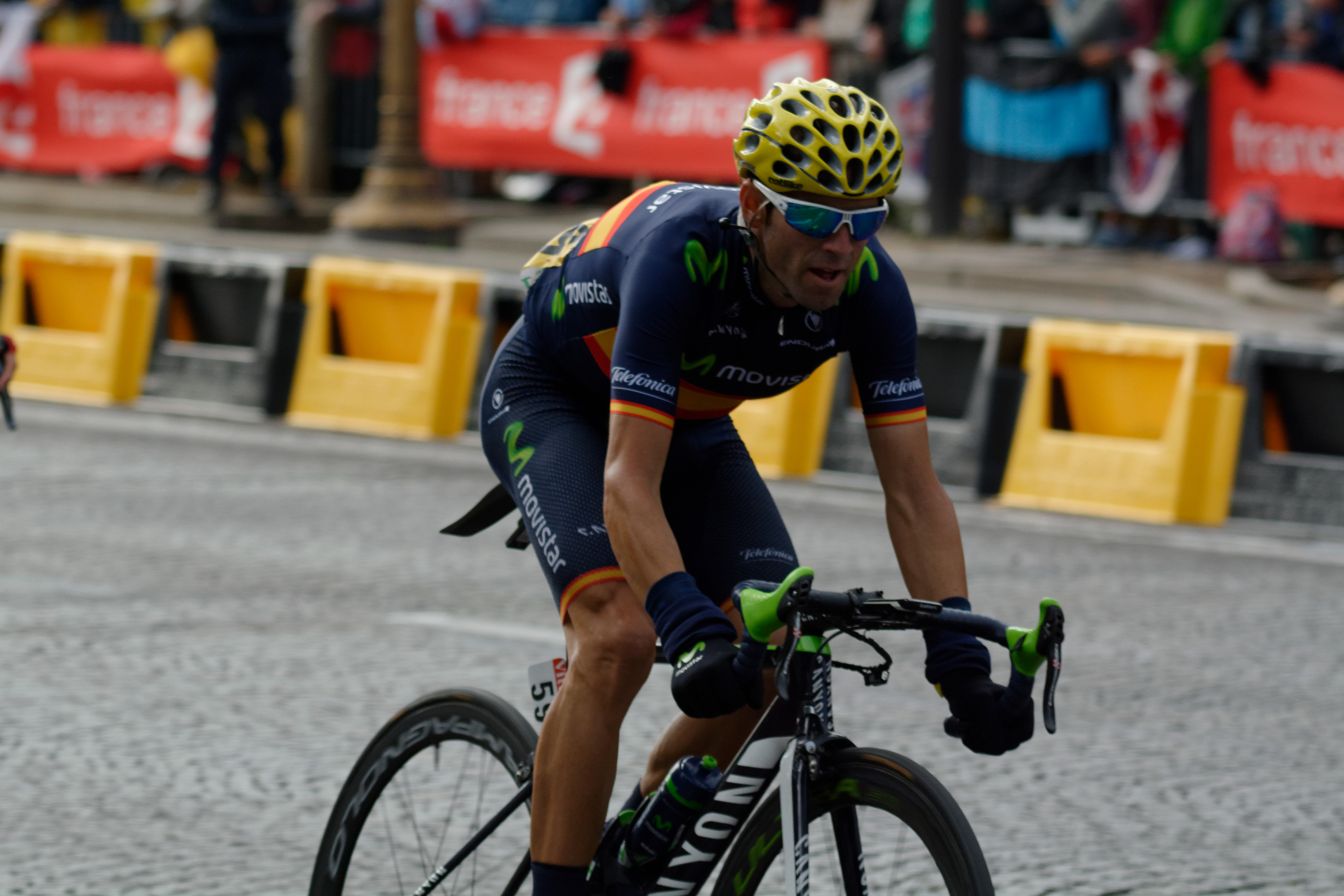 D71_3237_DxO